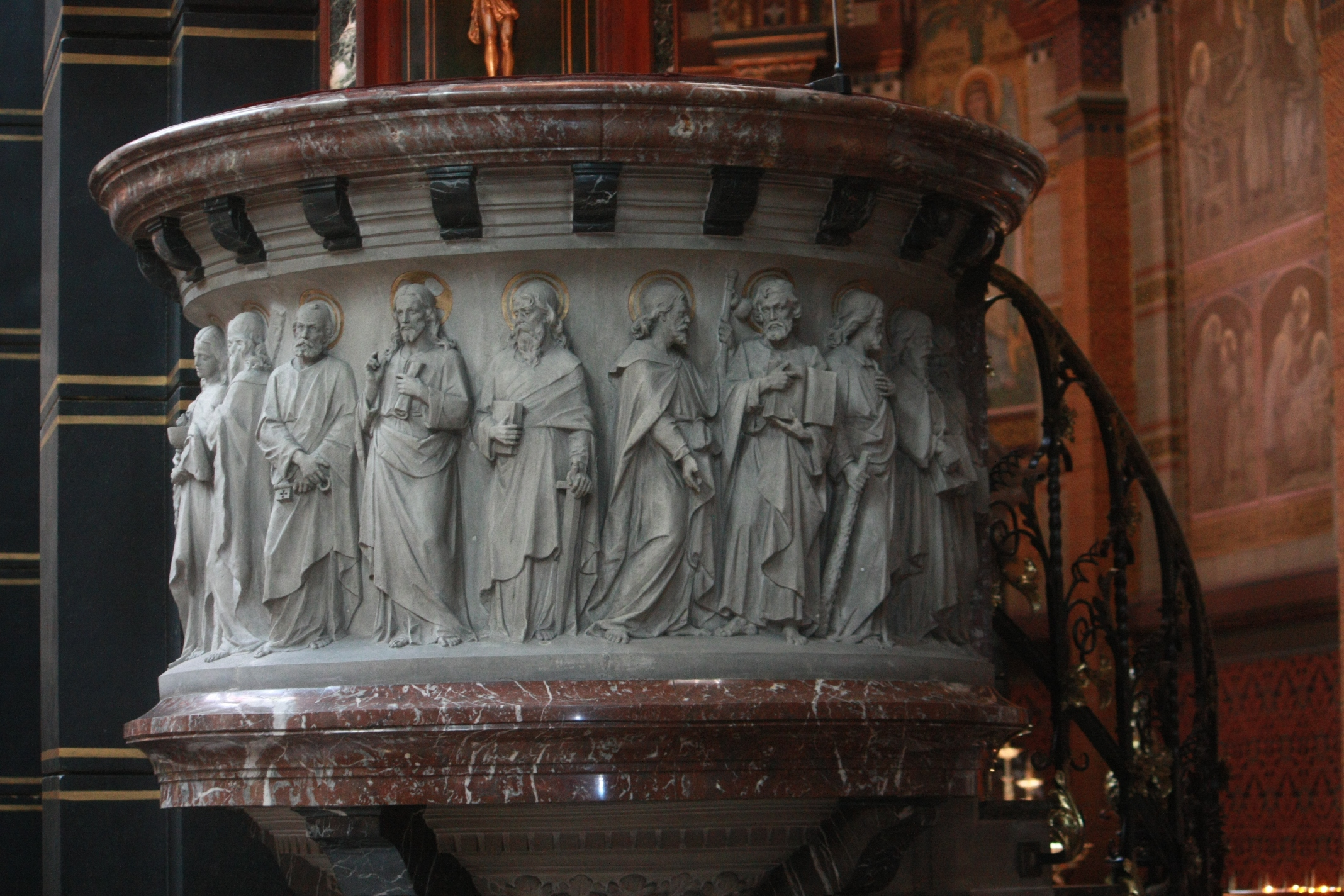 Amsterdam, Sint Nicolaasbasiliek, Kansel detail